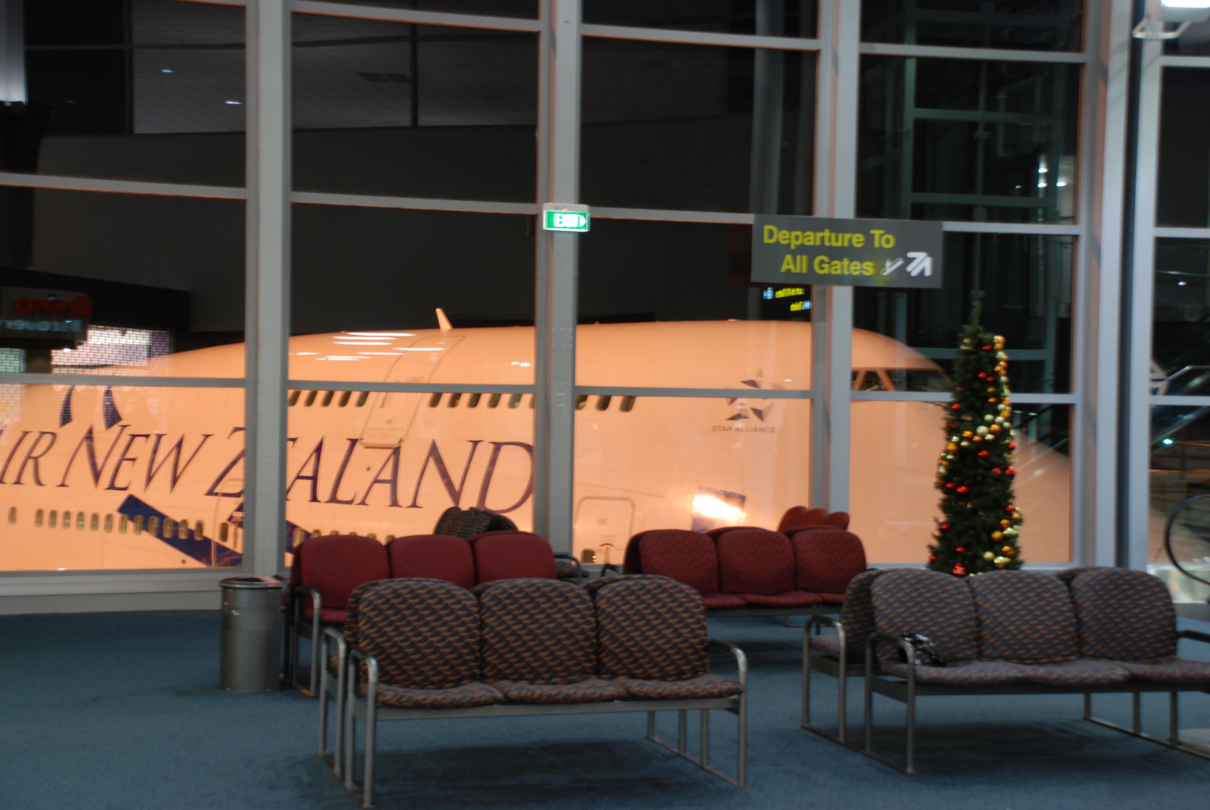 Departing for Hong Kong